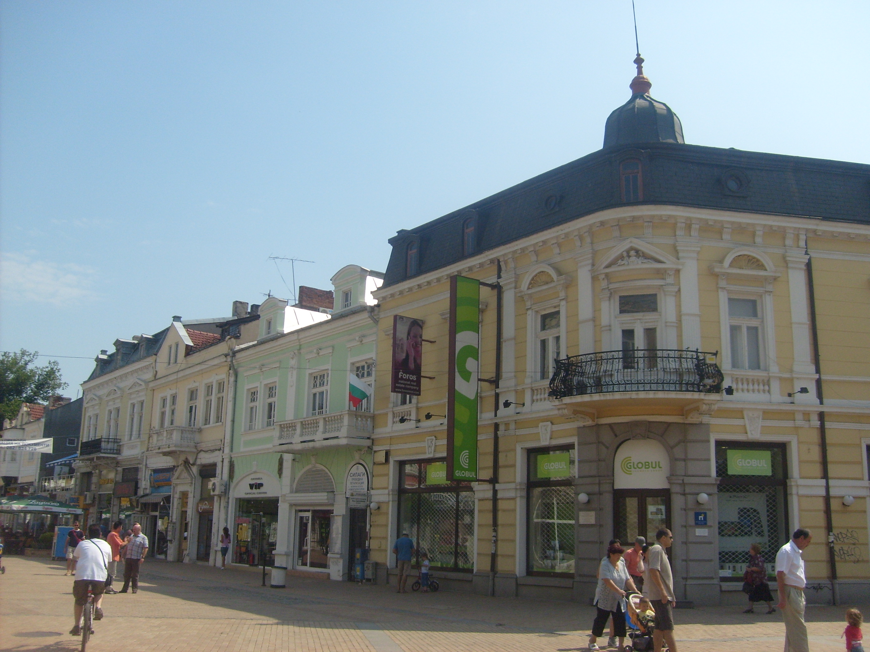 Ruse, Bulgaria